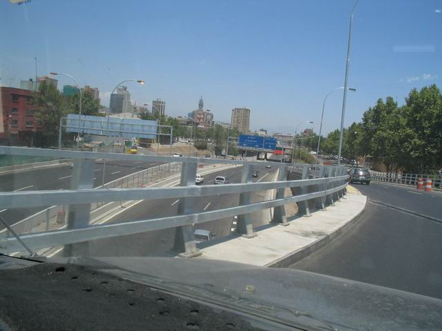 Autopista Central (Av. Norte-Sur) Centro de Santiago por Emilio Sepúlveda (DJ Funkin'mixer) No contiene Copyright debido a que es una fotografía tomada desde el lugar directamente, no sacada de otra página web.